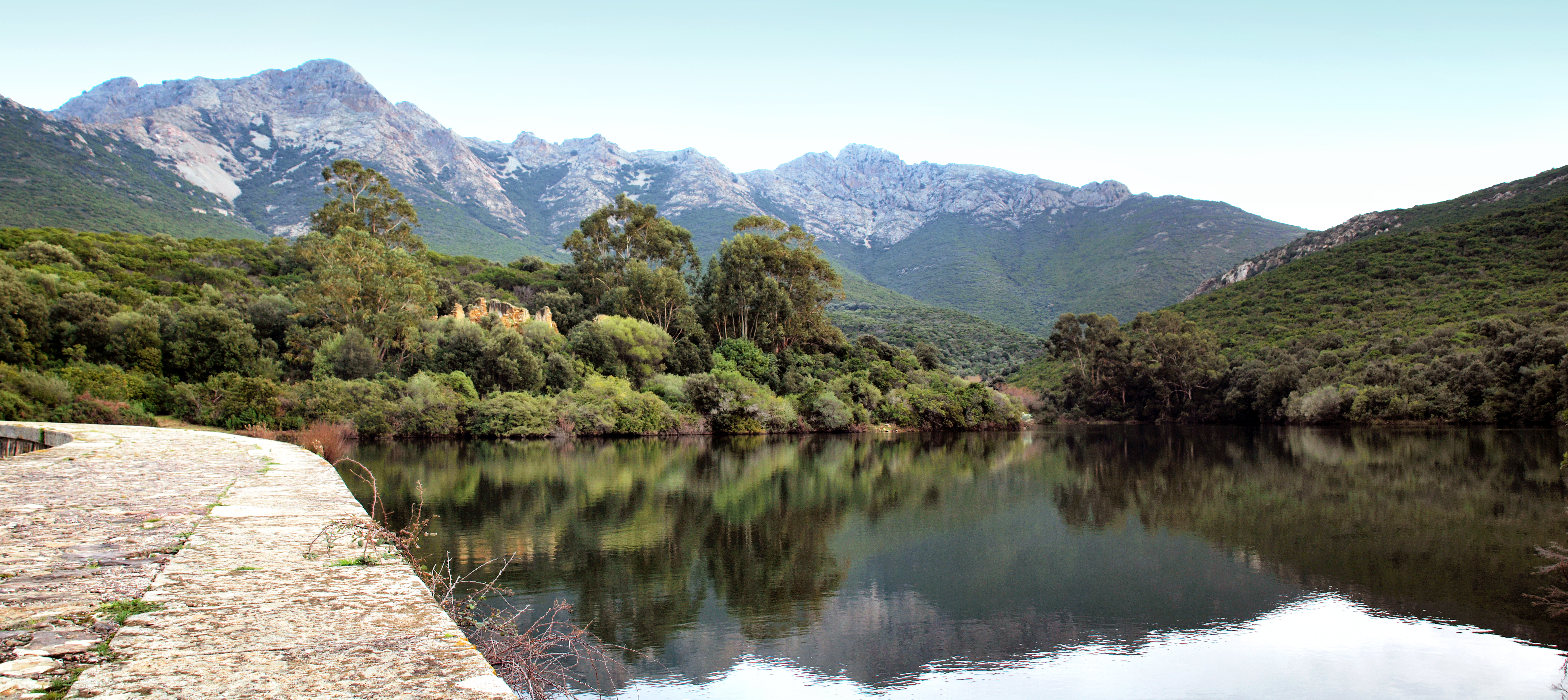 Galéria, Balagne (Corse) - Lac de barrage de l'Argentella qui était destiné aux besoins de l'exploitation des mines de l'Argentella aux XIXe - début XXe siècles